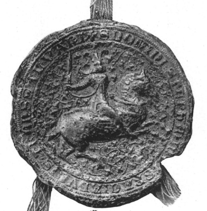 Anjou István erdélyi herceg pecsétje 1351-ből